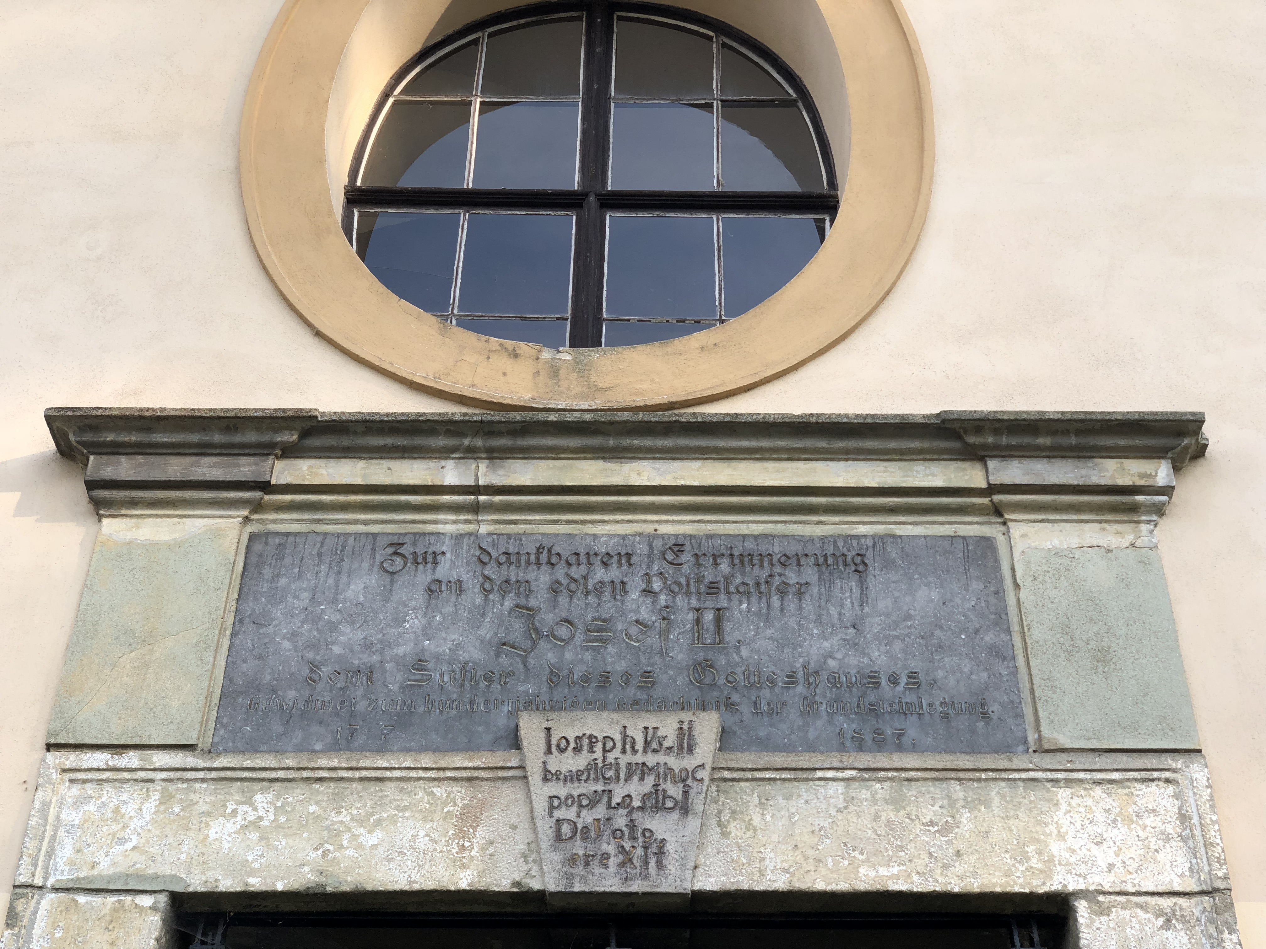 Pamětní nápis na kostele sv. Pia V. v Homoli u Panny